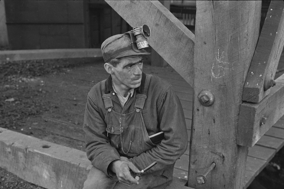 Kohlenarbeiter in Kentucky. Kentucky coal miner, Jenkins, Kentucky. Shahn, Ben, 1898-1969, photographer. CREATED/PUBLISHED 1935 Oct. NOTES Title and other information from caption card. Transfer; United States. Office of War Information. Overseas Picture Division. Washington Division; 1944. SUBJECTS Miners, mining towns--Kentucky Nitrate negatives. United States--Kentucky--Jenkins. RELATED NAMES United States. Resettlement Administration. MEDIUM 1 negative : nitrate ; 35 mm. CALL NUMBER LC-USF33- 006194-M3 REPRODUCTION NUMBER LC-USF3301-006194-M3 DLC (b&w film dup. neg.) PART OF Farm Security Administration - Office of War Information Photograph Collection (Library of Congress) REPOSITORY Library of Congress Prints and Photographs Division Washington, DC 20540 USA DIGITAL ID (intermediary roll film) fsa 8a16946